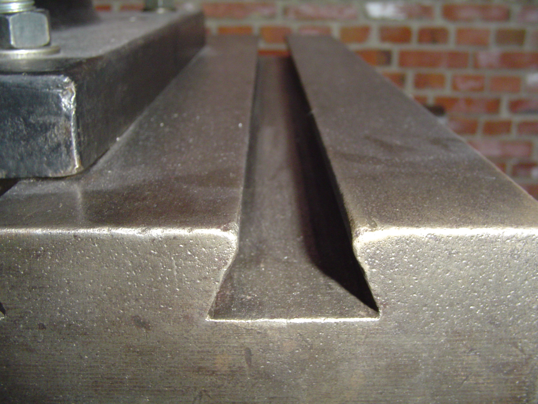 Schwalbenschwanzführung aufgenommen im Sächsischen Industriemuseum Chemnitz